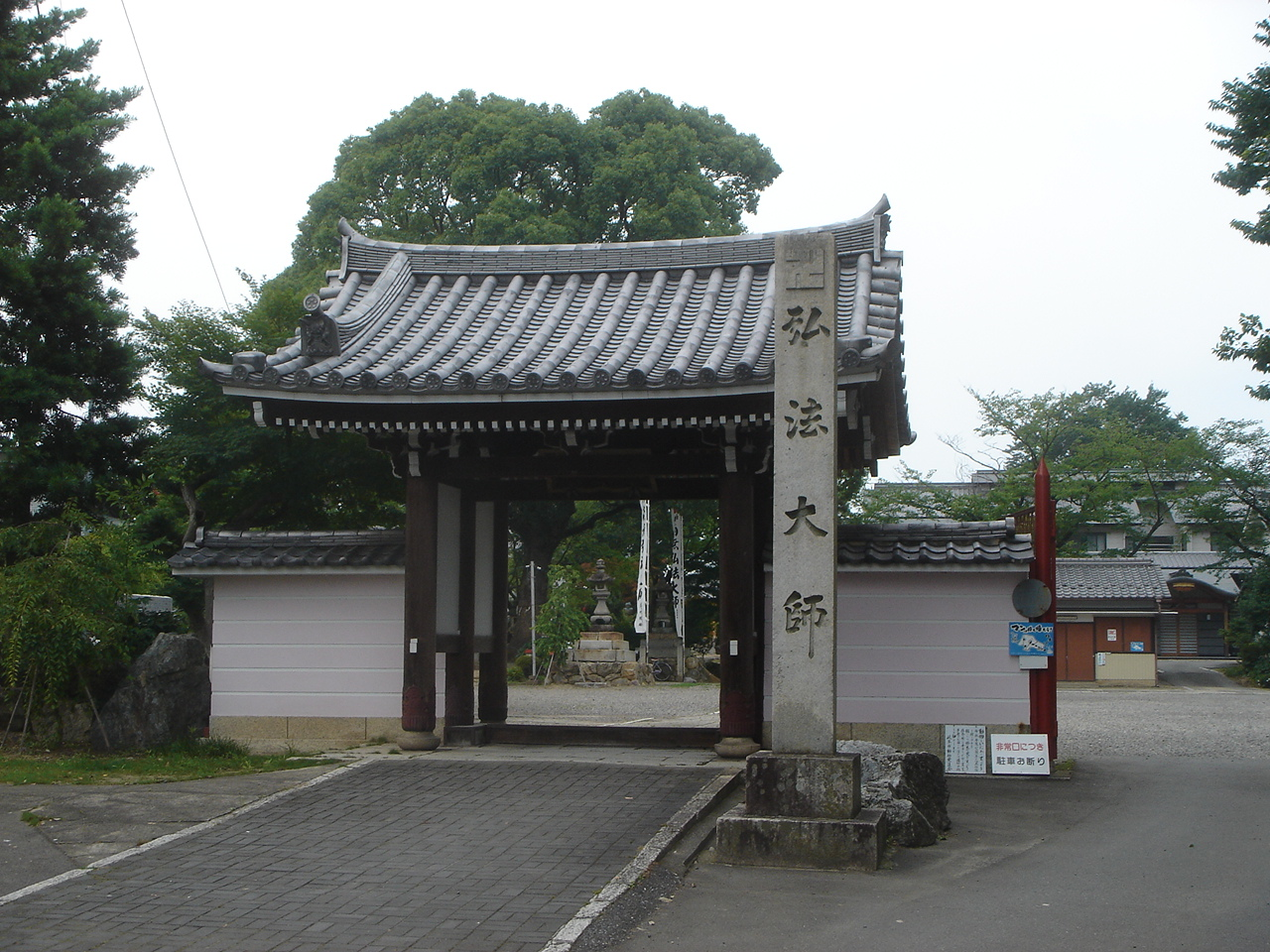 Osshinji(Temple)(乙津寺),Gifu,Gifu,Japan(岐阜県岐阜市)で撮影